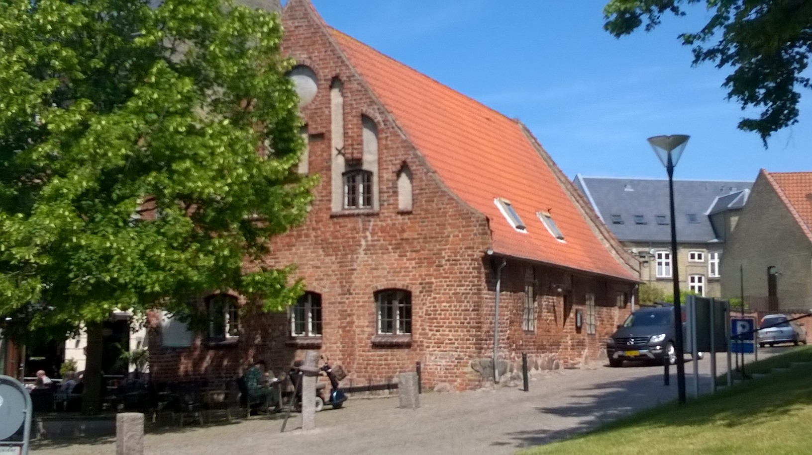 Den gamle Latinskole i Slagelse ved Sankt Mikkels Kirke. Bygningen er fra omkring 1490.